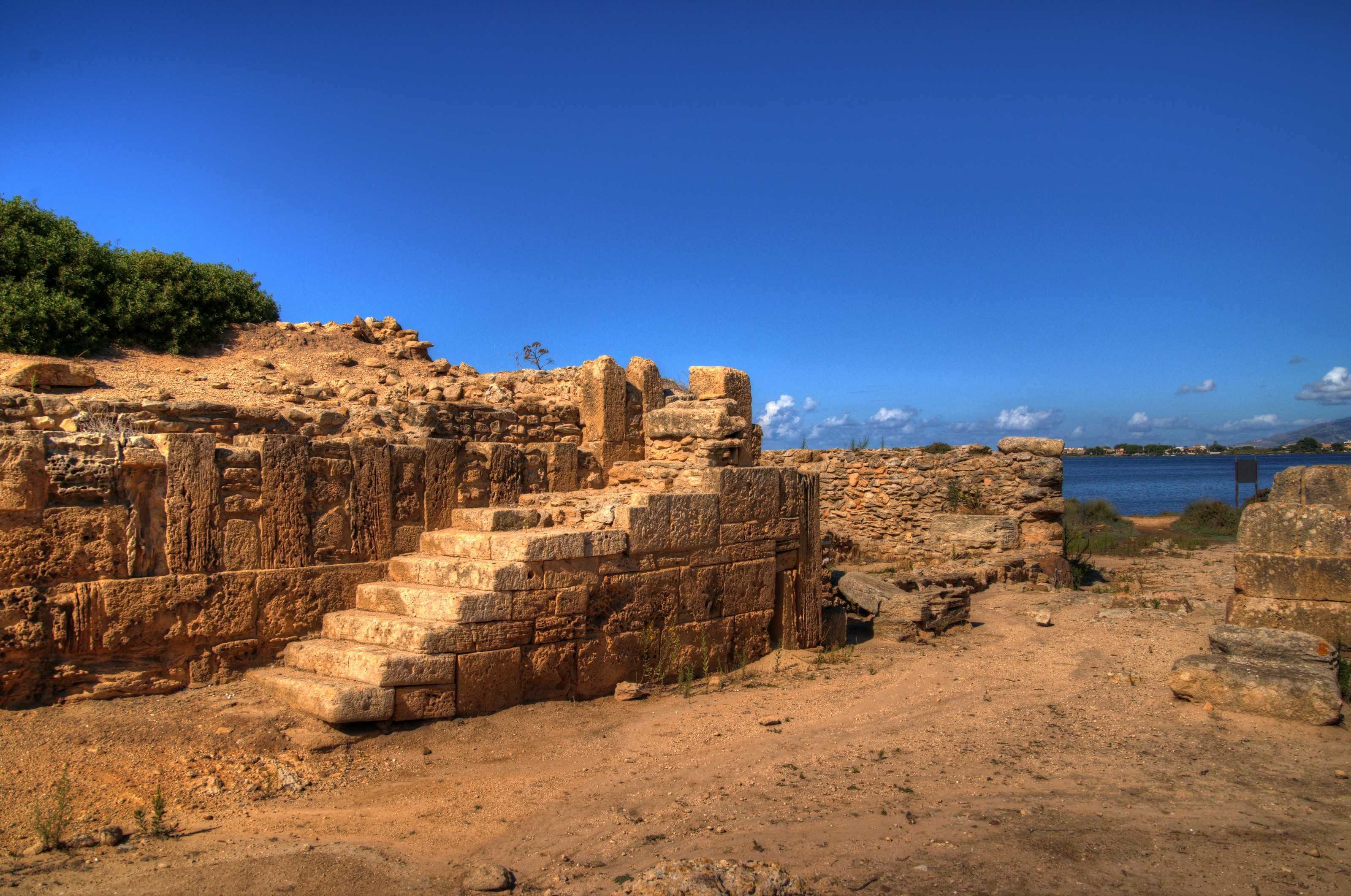 Mozia: Nordtor